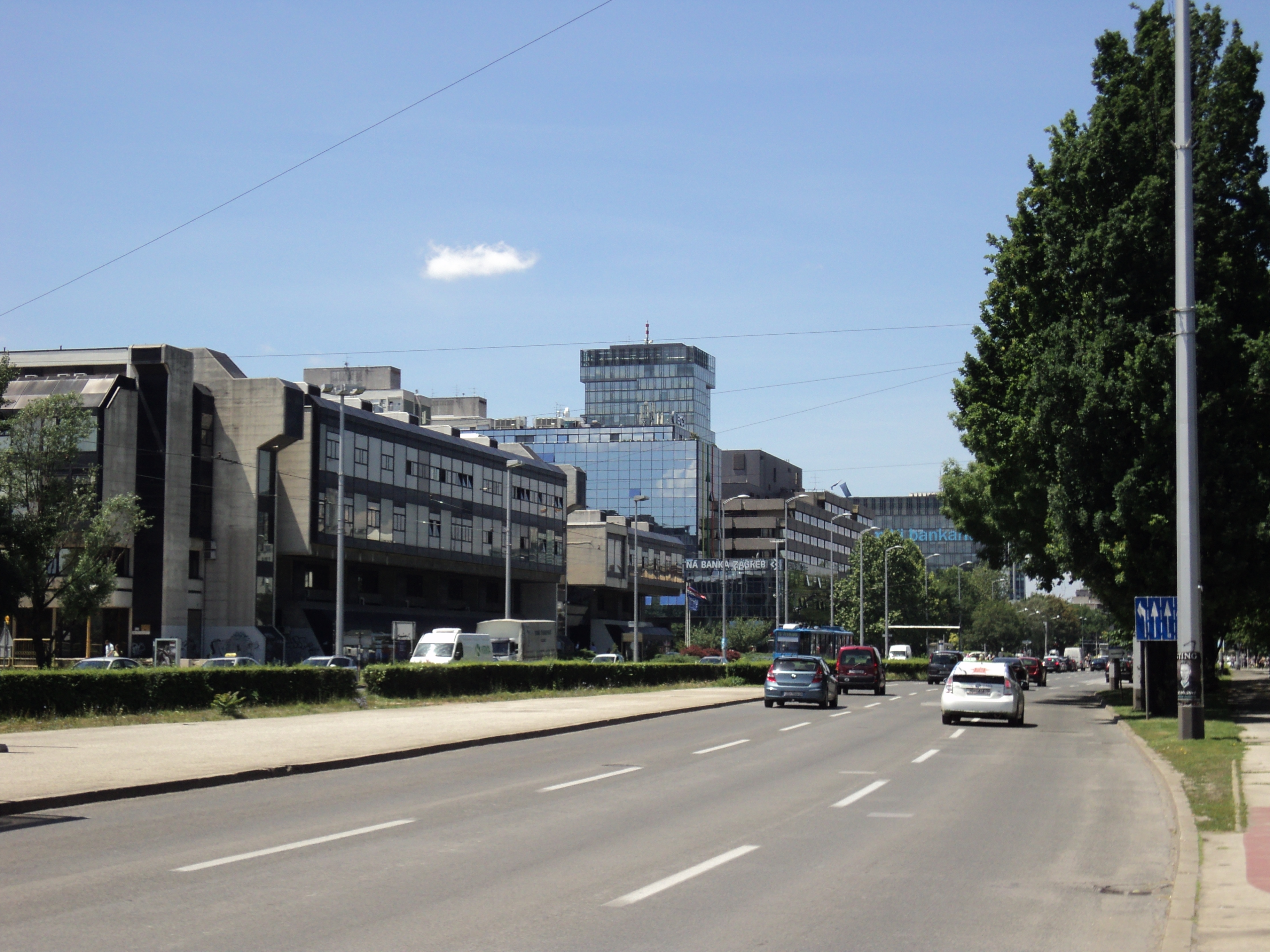 Pogled na Vukovarsku ulicu prema zapadu.